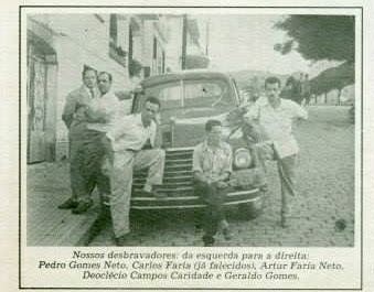 Todos os integrantes reunidos